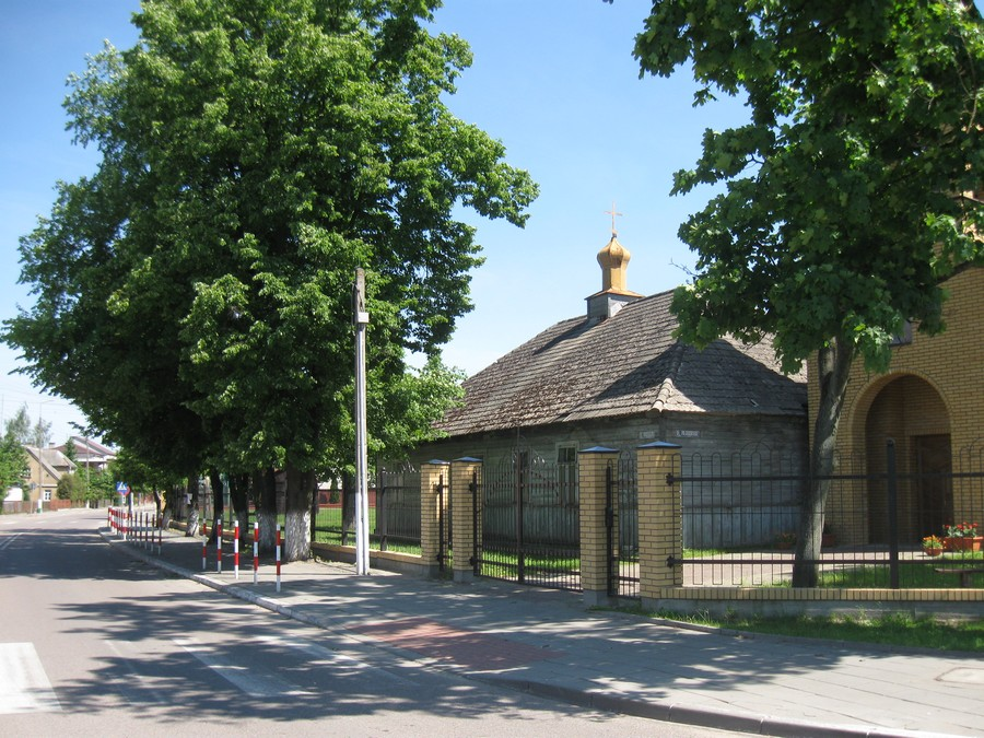 Nieistniejąca już, drewniana cerkiew pw. św. Symeona Słupnika w Brańsku. Po prawej stronie zdjęcia widoczne jest wejście do nowej cerkwi pod tym samym wezwaniem.